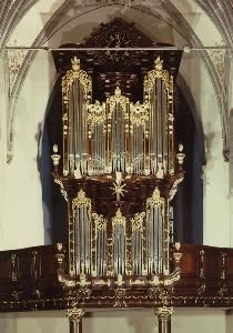 Orgel der ehem. Klosterkirche Kornelimünster